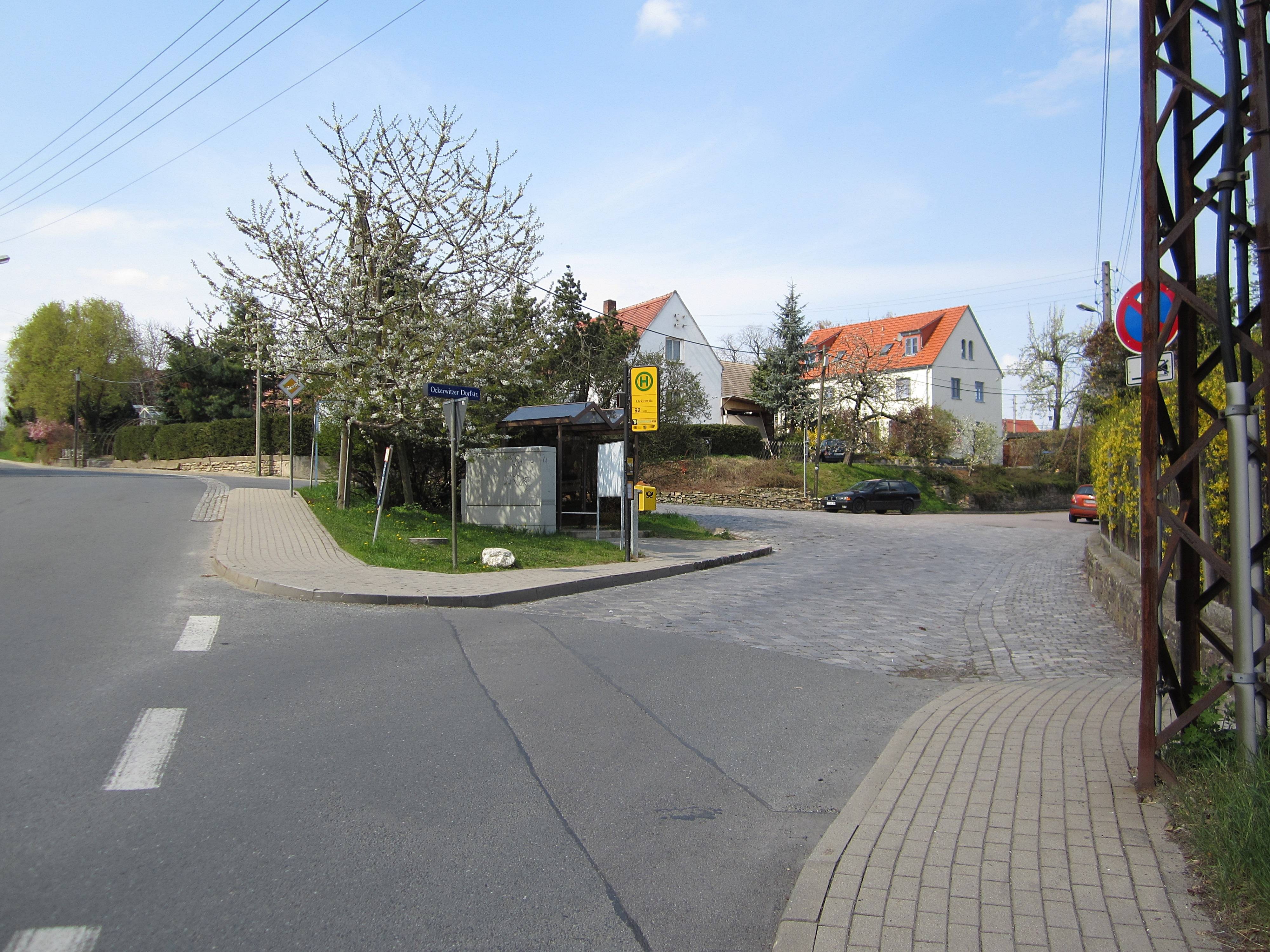 Ockerwitzer Allee/Ockerwitzer Dorfstraße, Endhaltestelle Linie 92